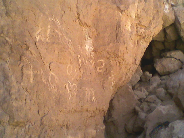 L'entrée de la grotte du lupus a Béni-Abbés Algerie